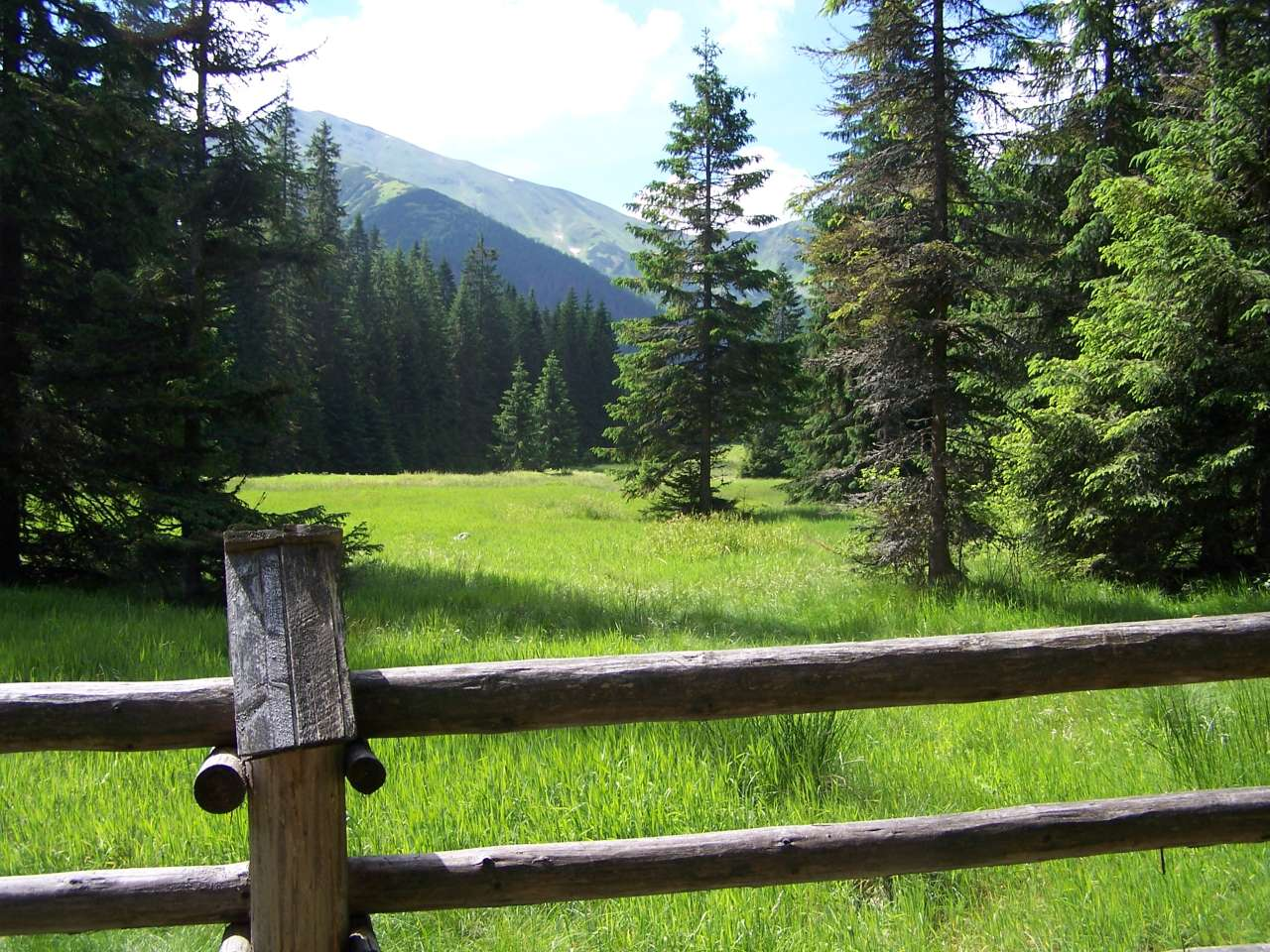 Dolina Pyszniańska